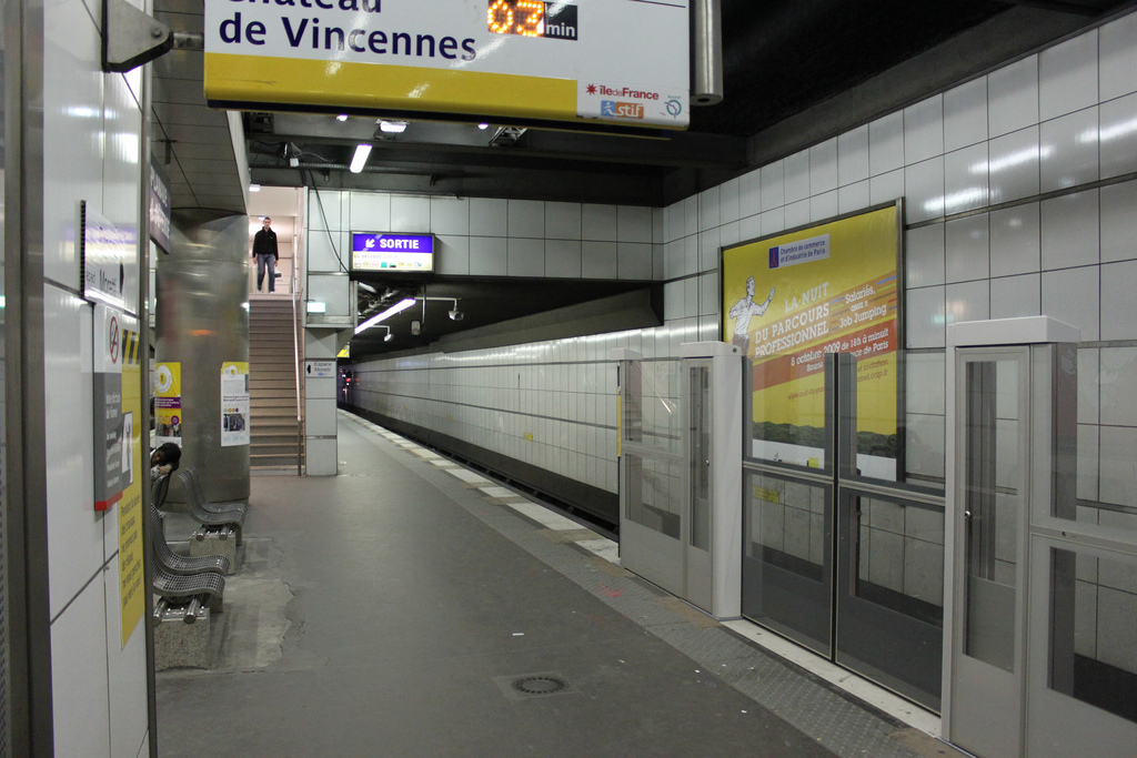 Portes palières en cours de pose à Esplanade de la Défense